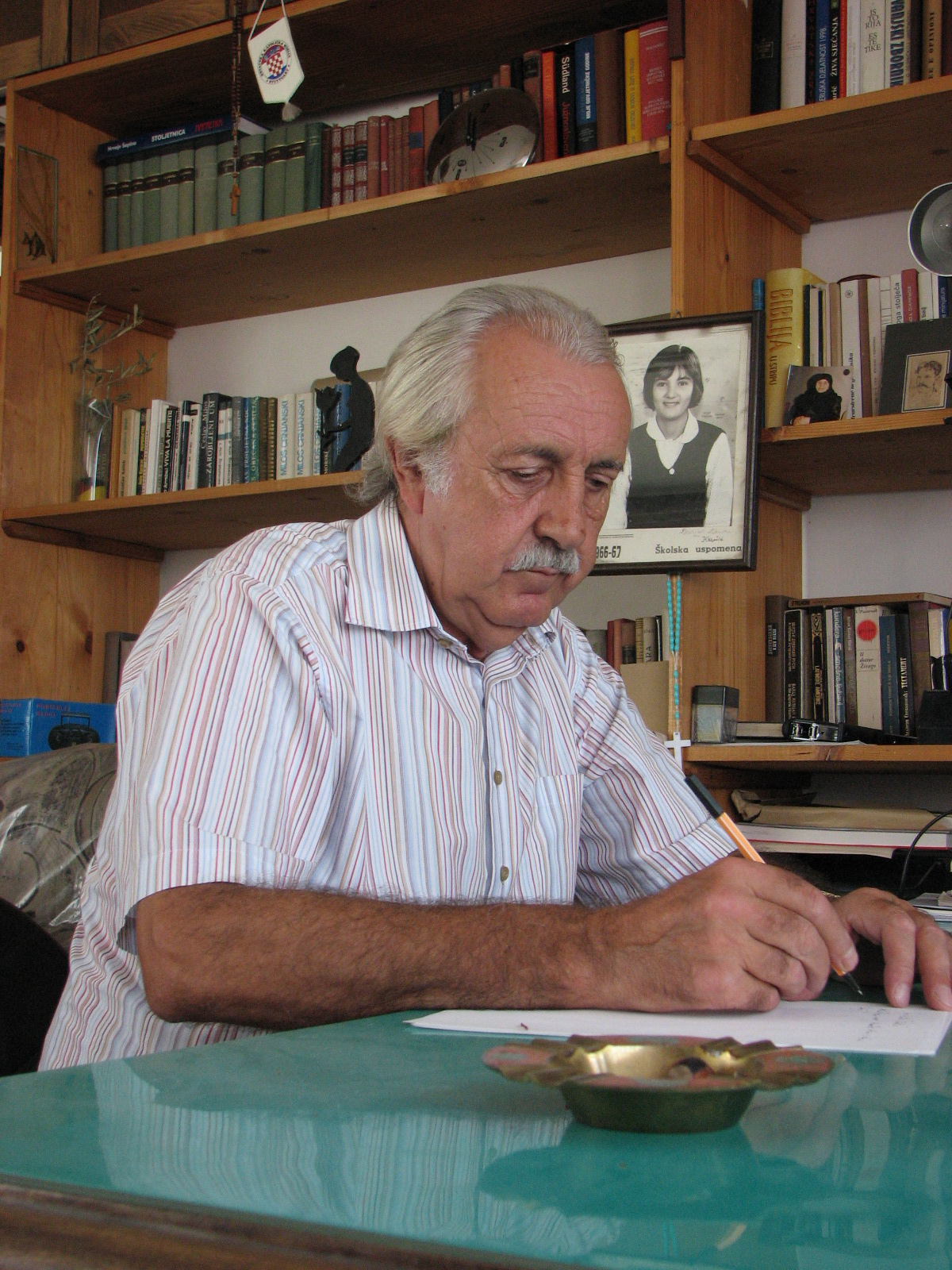 Književnik Ante Matić sjedi za svojim radnim stolom.